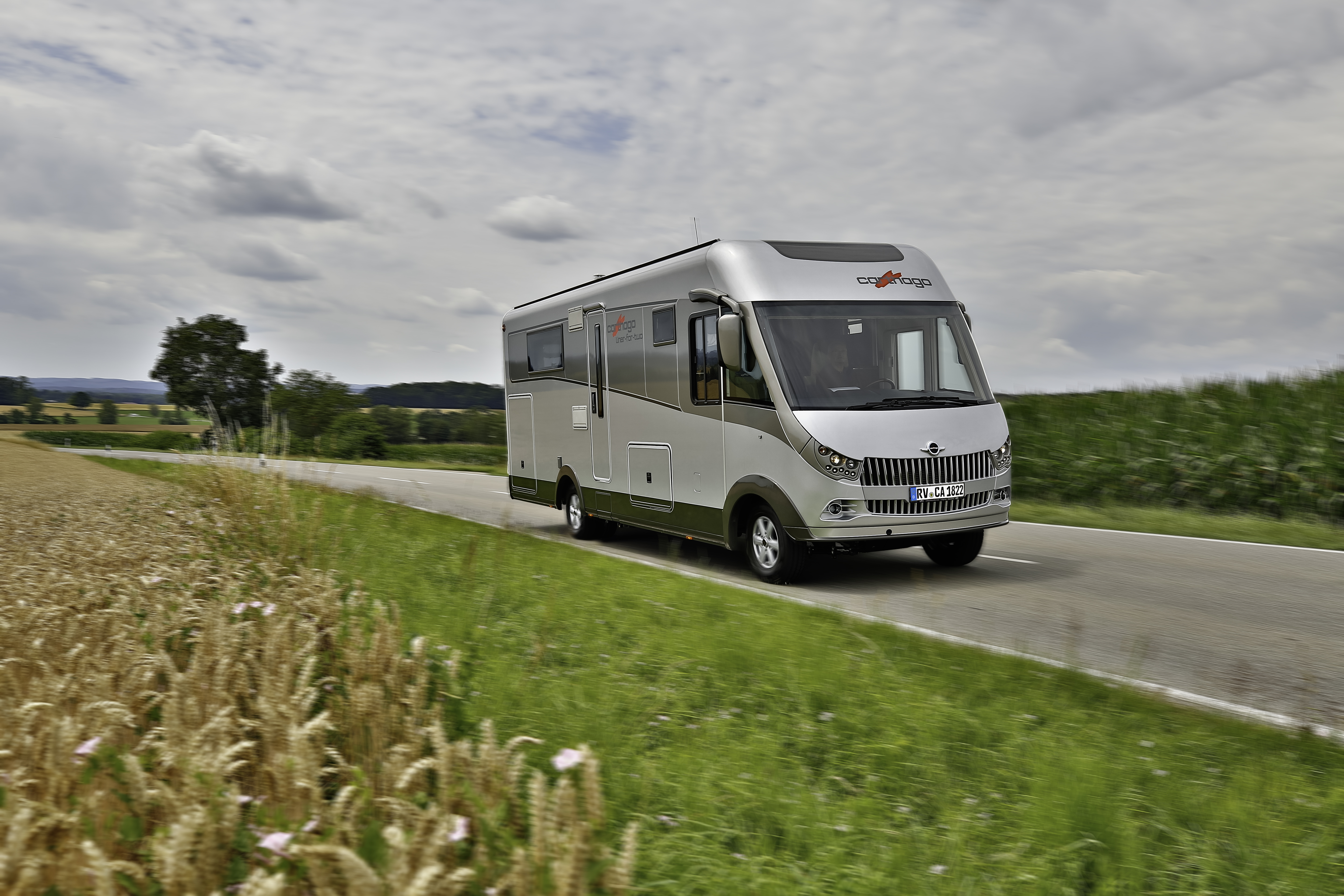 liner-for-two